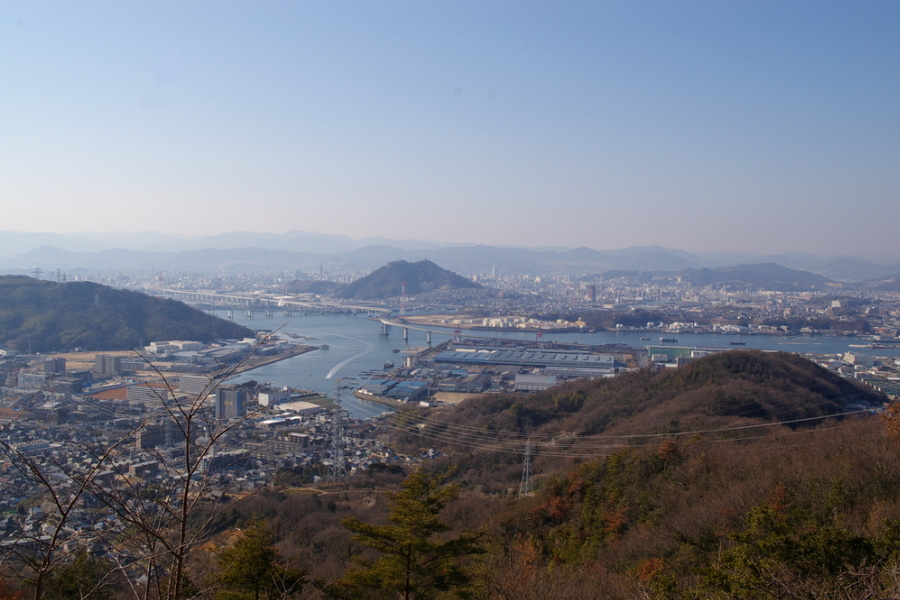 坂町高尾山からの眺望（広島方面）